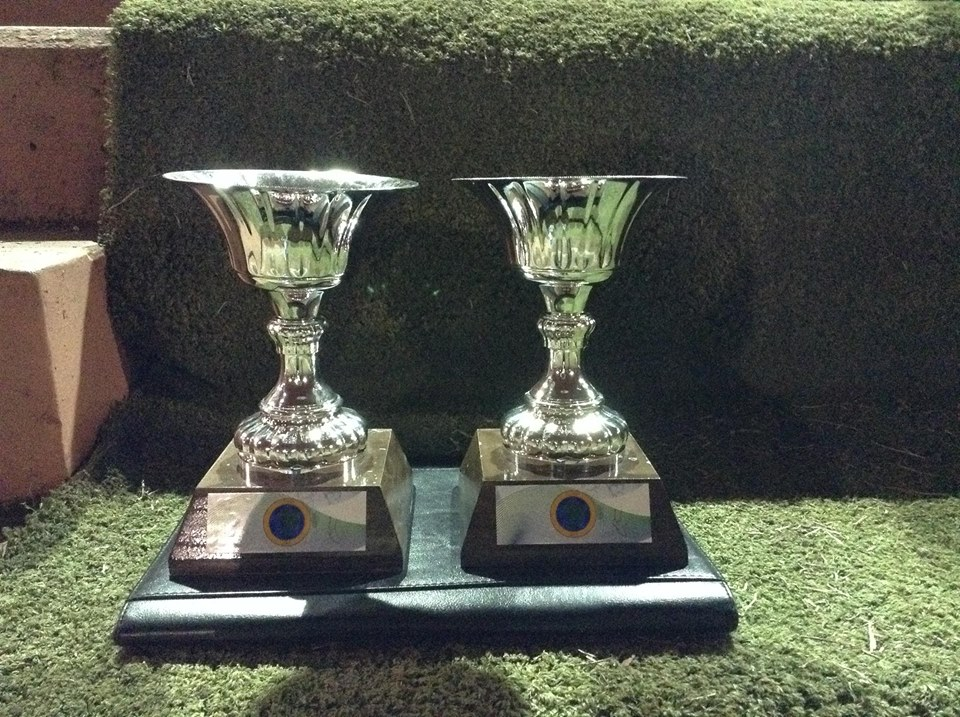 Partido del 31 de julio de 2014 que enfrento a esta selección contra la de la comunidad de descendientes armenios de argentina en Buenos Aires, en el cuadro del 99avo Congreso Universal de EsperantoEsperanto: Matĉo de la 31a de julio 2014 inter la esperanta teamo kaj la armen-devena argentina komunumo en Bonaero, kadre de la 99a UK.